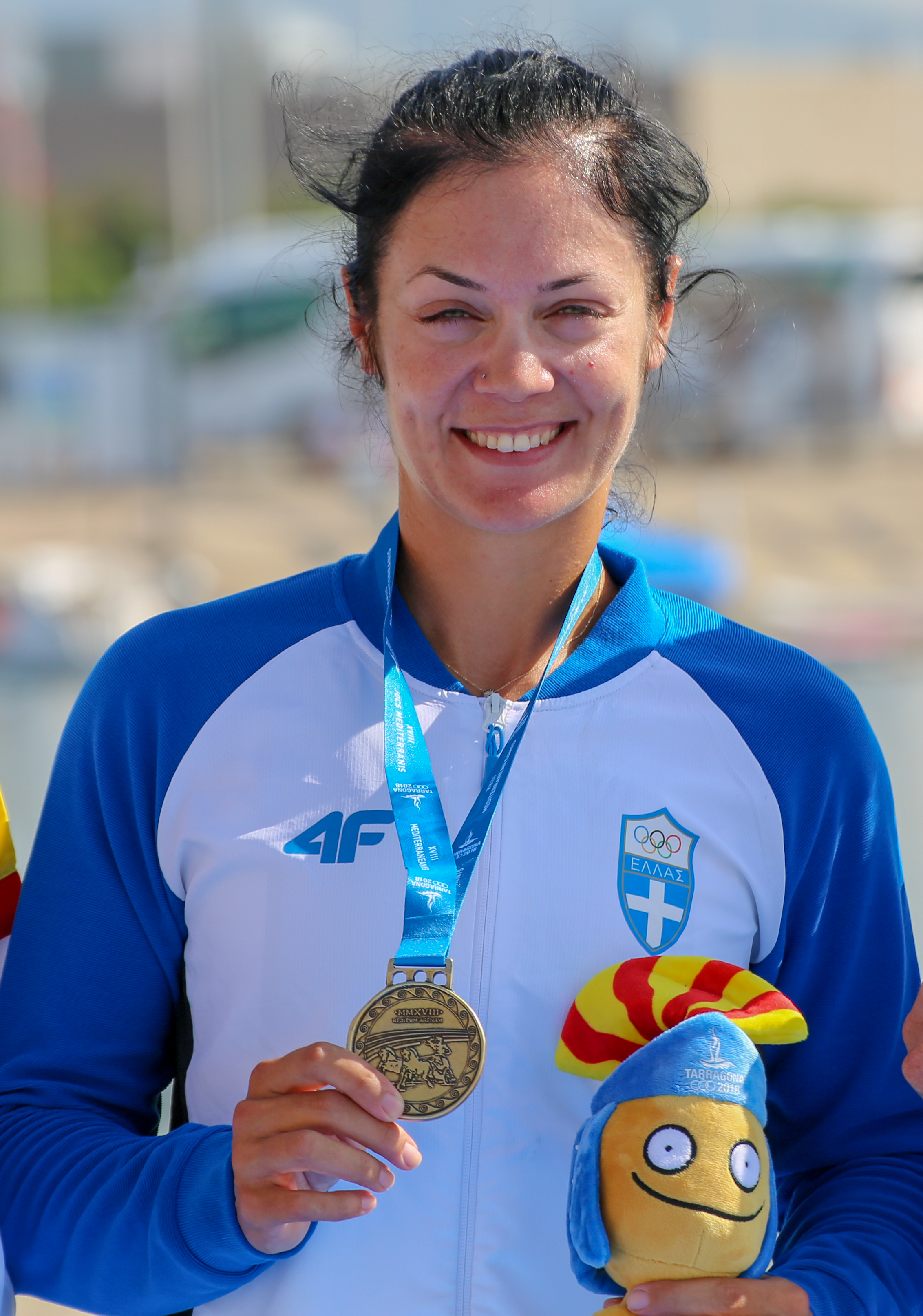 Aikaterini Nikolaidou, oro en los Juegos del Mediterráneo 2018